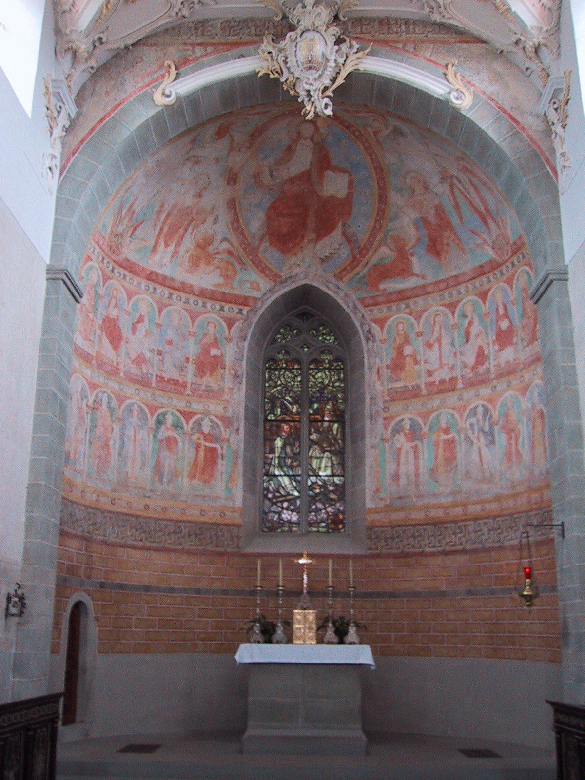 Apsis der romanischen Kirche St. Peter und Paul in Niederzell auf der Insel Reichenau.